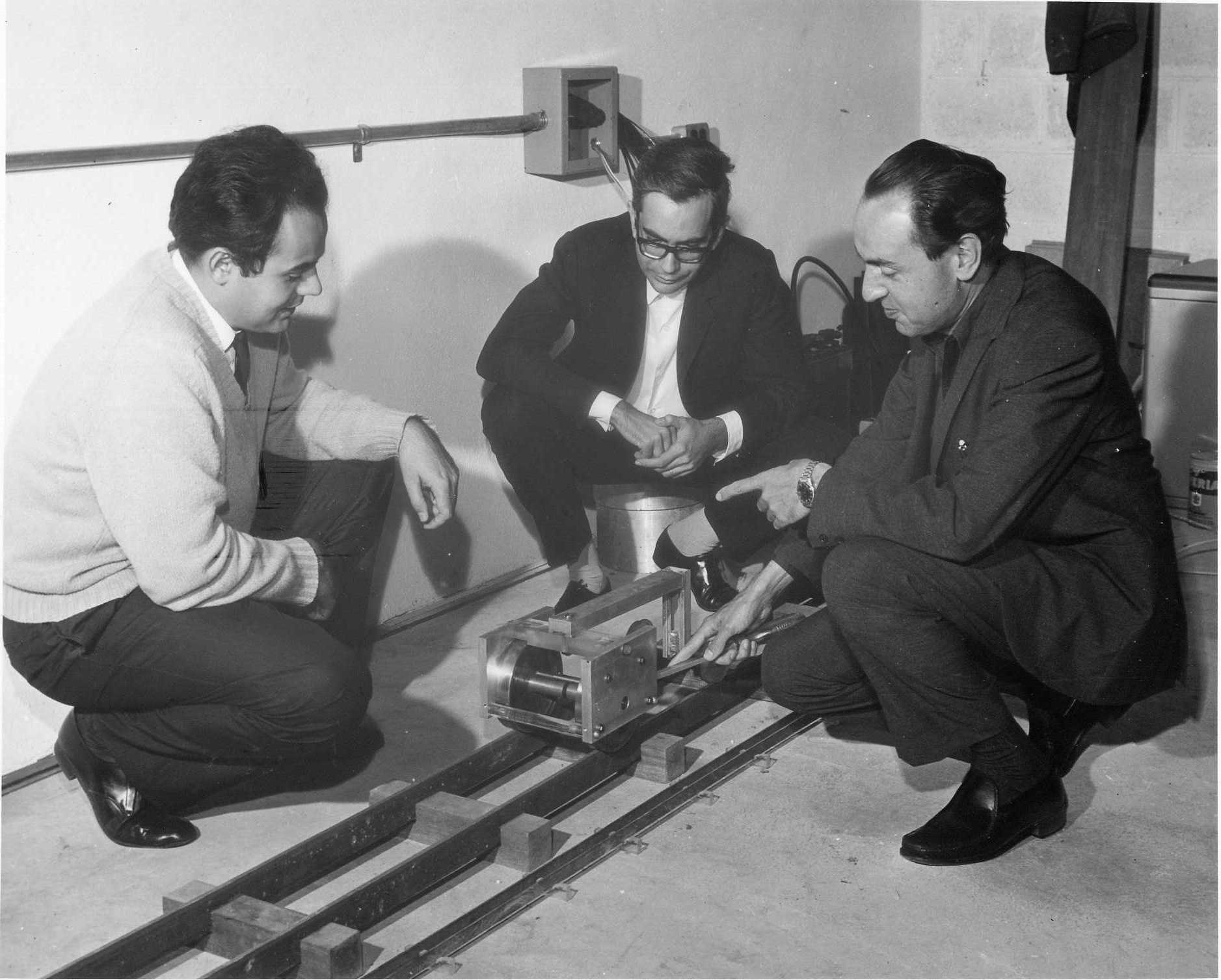 Primeras pruebas de tracción Magnética en el IVIC